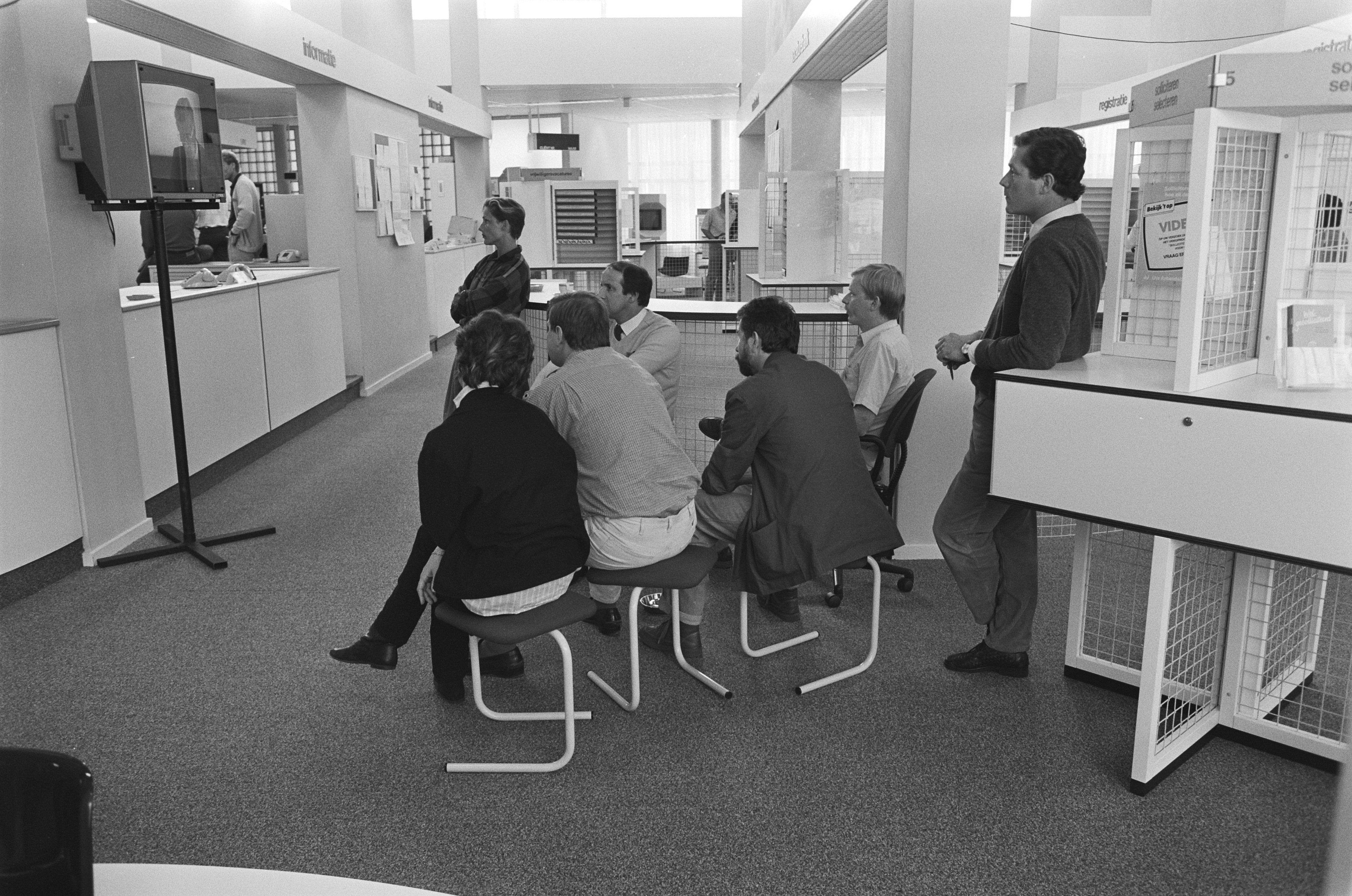 Collectie / Archief : Fotocollectie Anefo Reportage / Serie : [ onbekend ] Beschrijving : Opdracht Financieel Dagblad , opening nieuwe Gewestelijk Arbeidsbureau in Den Haag ; het Gewestelijk Arbeidsbureau Datum : 9 september 1985 Locatie : Den Haag, Zuid-Holland Trefwoorden : Arbeidsbureaus, Openingen Instellingsnaam : Financieel Dagblad Fotograaf : Croes, Rob C. / Anefo Auteursrechthebbende : Nationaal Archief Materiaalsoort : Negatief (zwart/wit) Nummer archiefinventaris : bekijk toegang 2.24.01.05 Bestanddeelnummer : 933-4177